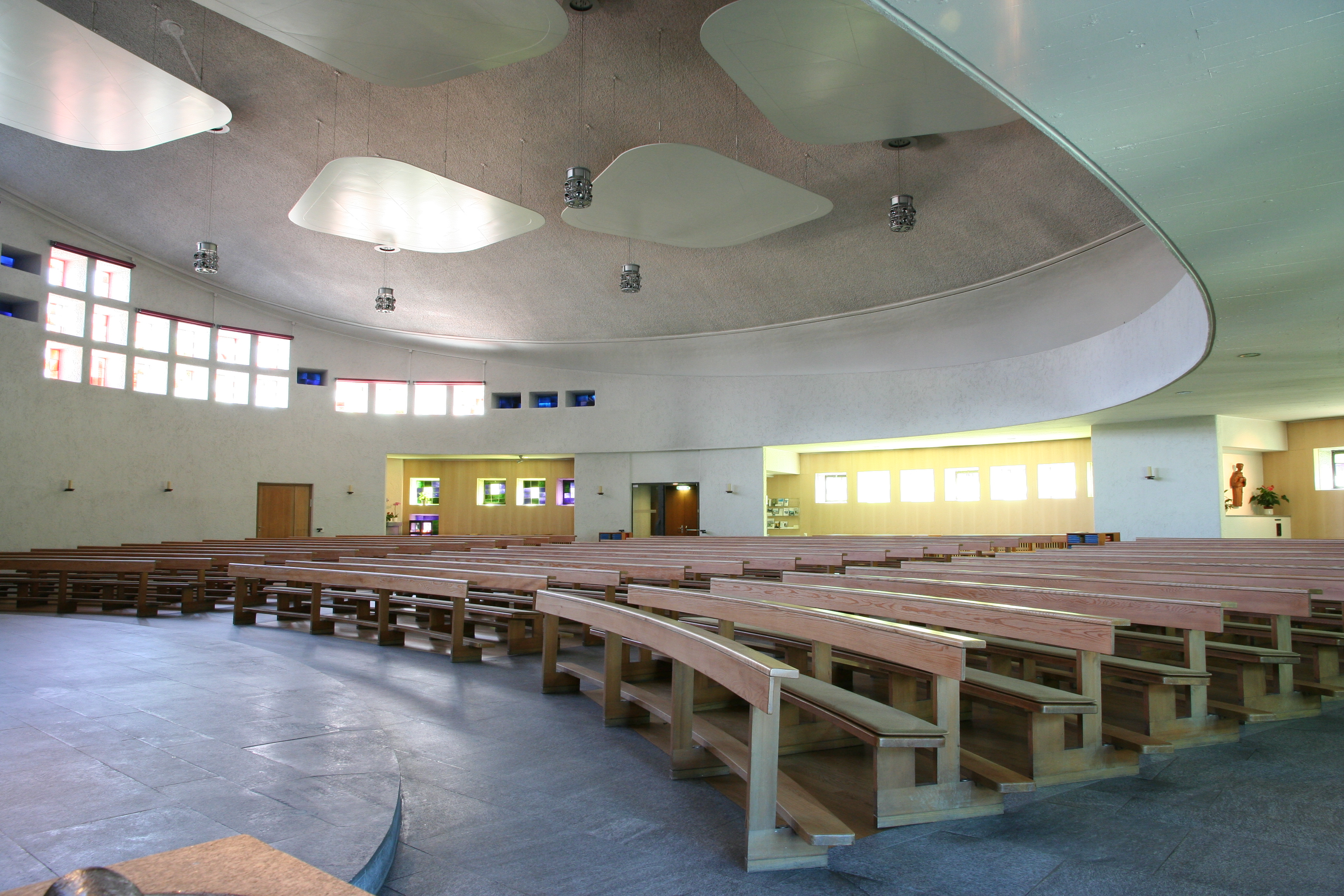 Römisch-katholische Pfarrkirche St. Josef Schlieren, Innenansicht